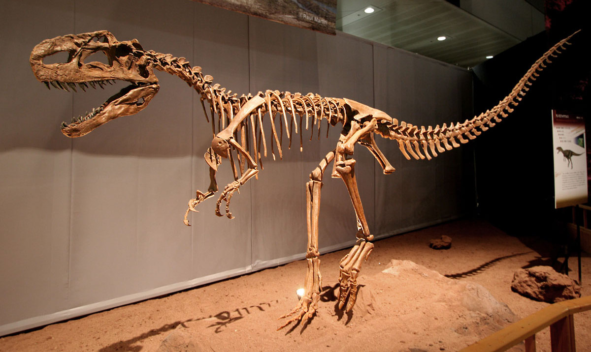 Monolophosaurus - 01